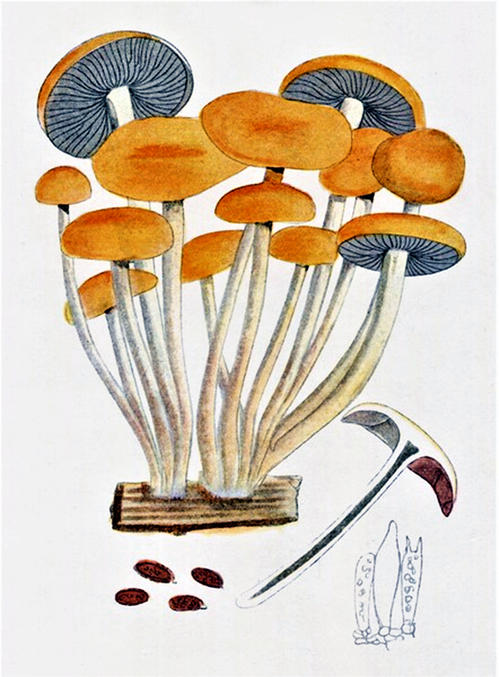 Giacomo Bresadola: Hypholoma capnoides (Fr., 1818) [P.Kumm. (1871)